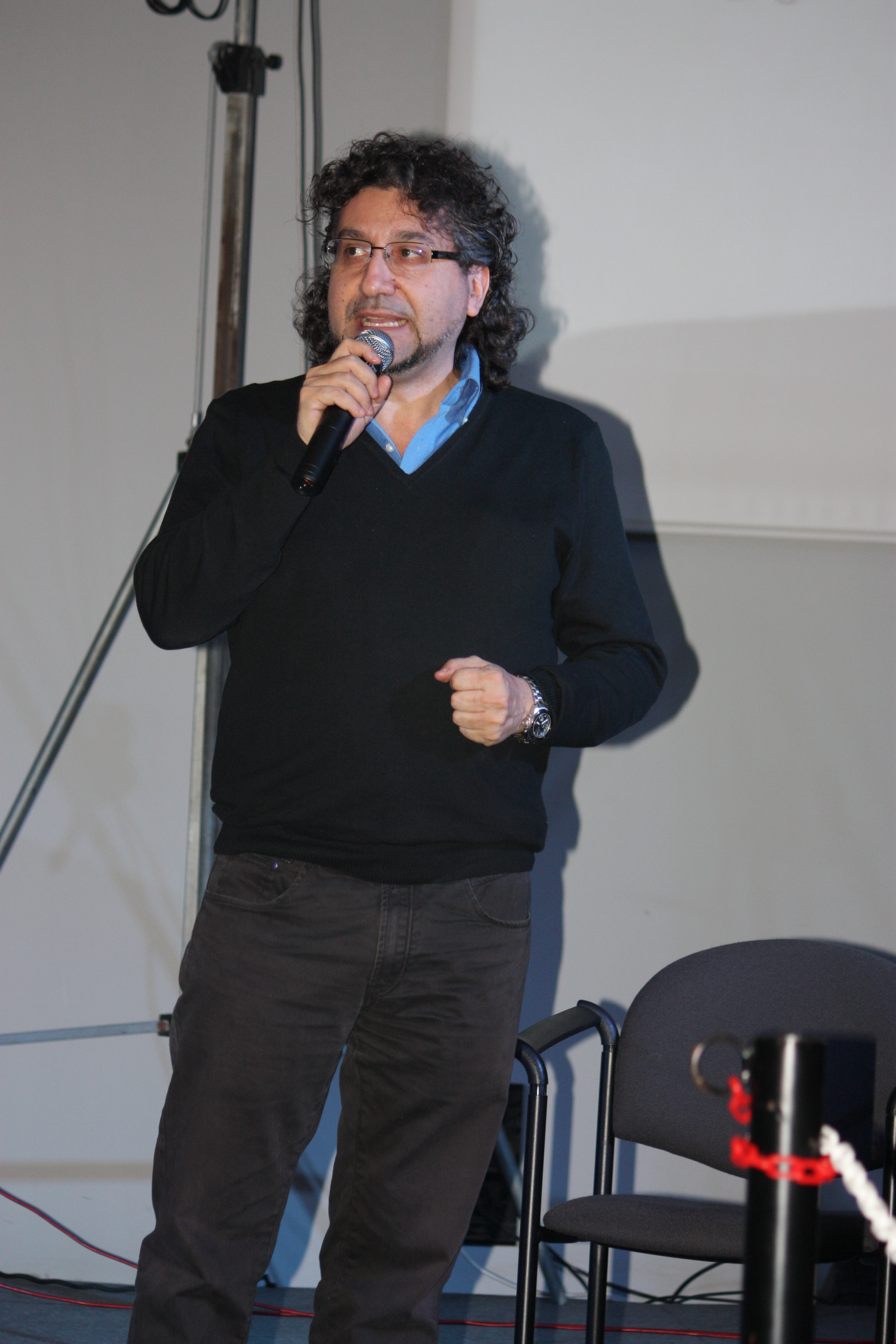 Ivo De Palma a Play, 2012, Modena